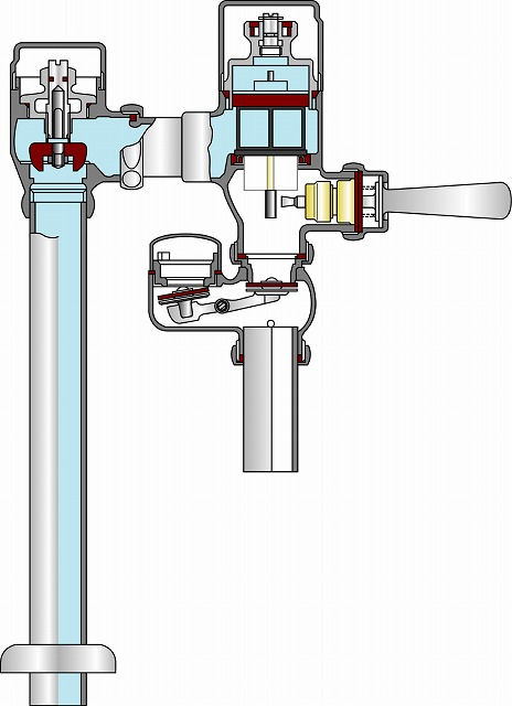 TOTO TV750